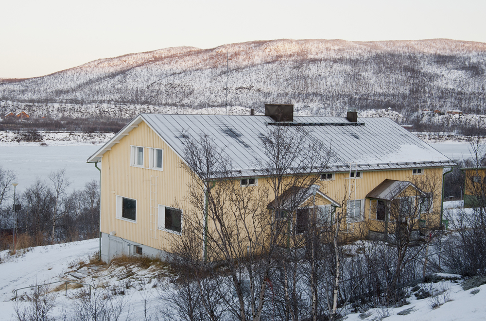 Vanha rajavartioasema Nuorgamissa Utsjoella. Tenojoen rannalla ja 800 m Norjan rajasta sijaitsevaan rakennukseen on rakennettu asuntoja sen jälkeen kun rajavartioston toiminta lakkautettiin Nuorgamissa.